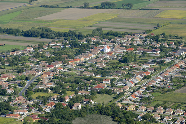 Adásztevel 2.